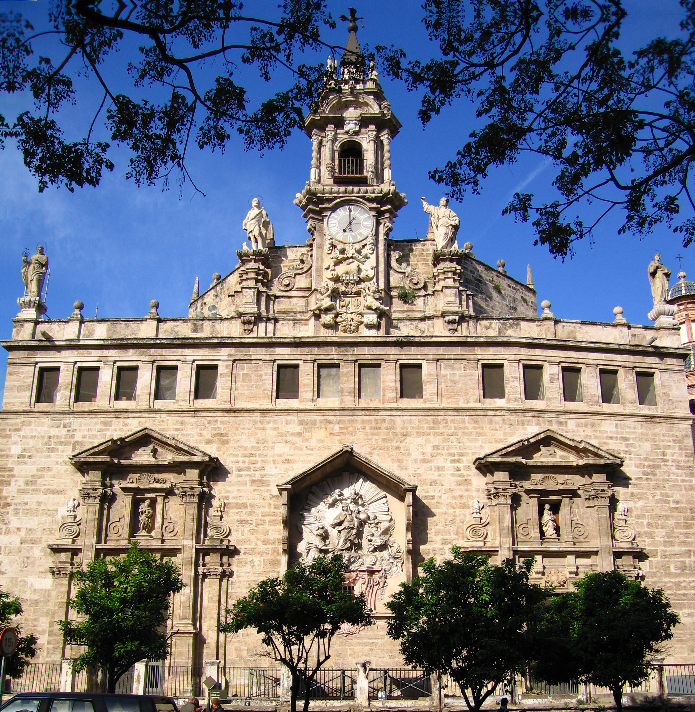 Sant Joan del Mercat València